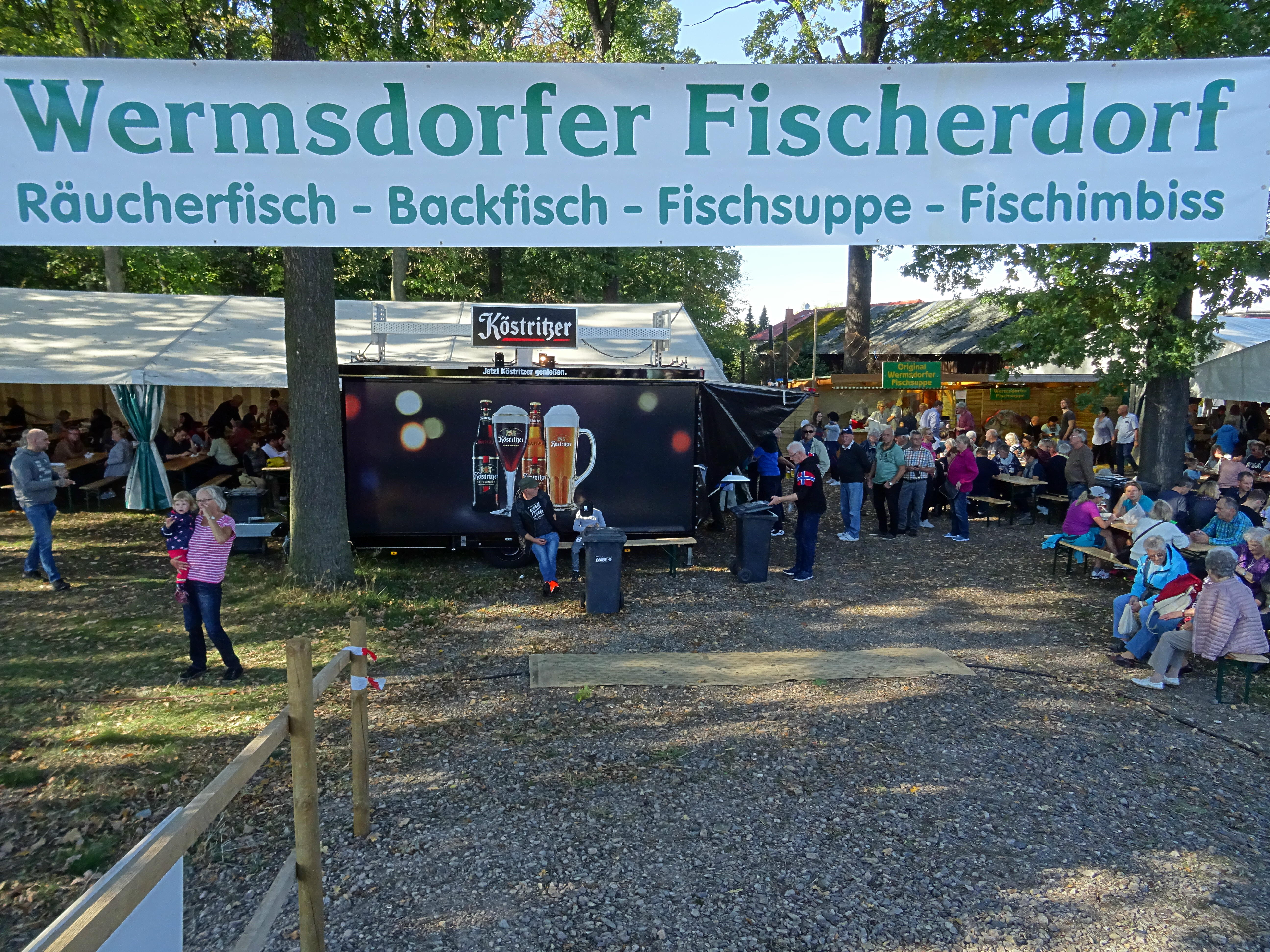 Horstseefischen: Seit 500 Jahren sind Zuchtfische aus Wermsdorf begehrt. Beim 50. Fischerfest vom 11. bis 13. Oktober 2019 wird das Abfischen aus dem 70 Hektar großen Horstsee traditionell gefeiert.